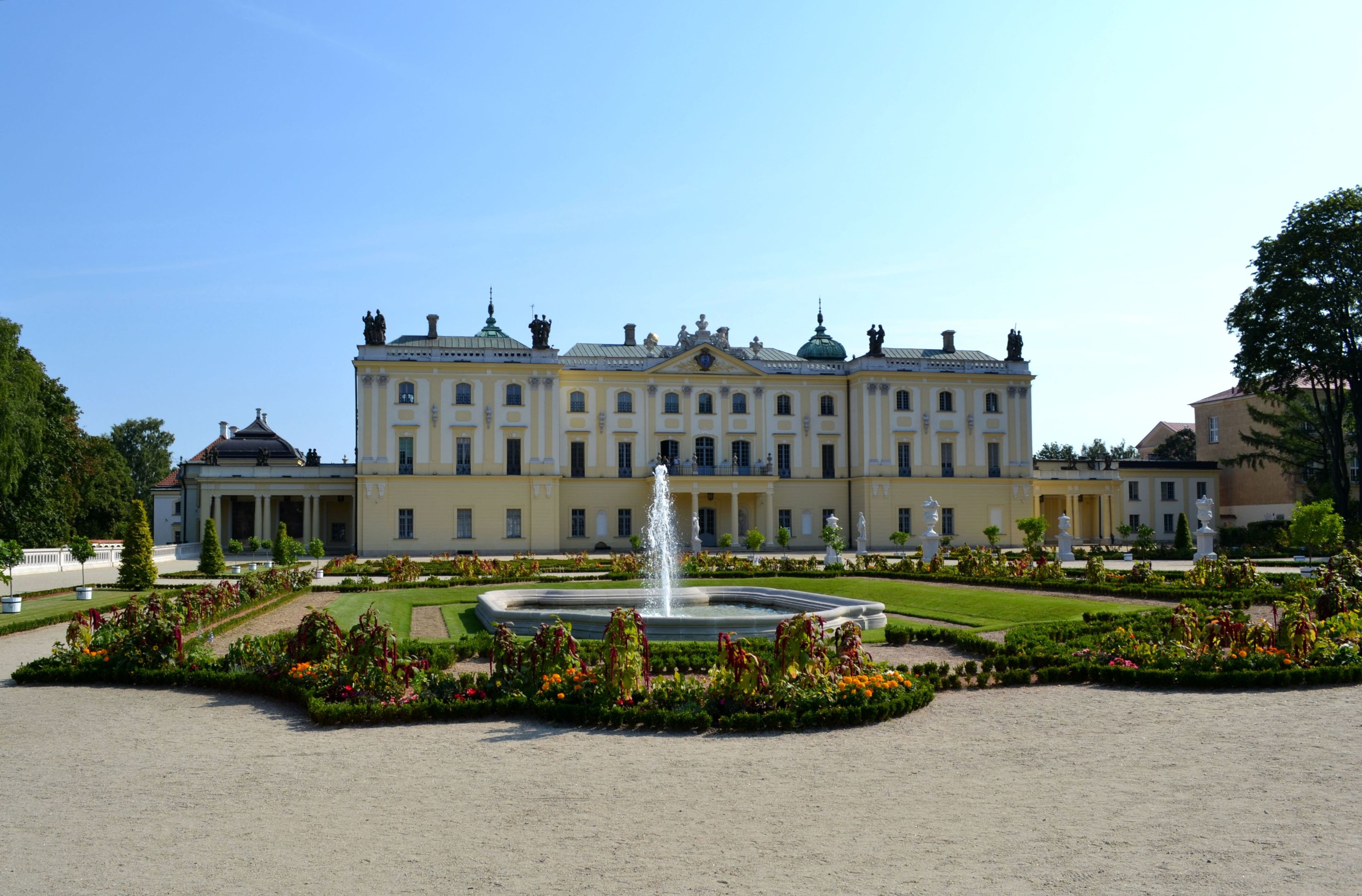 Białystok, zespół pałacowy Branickich